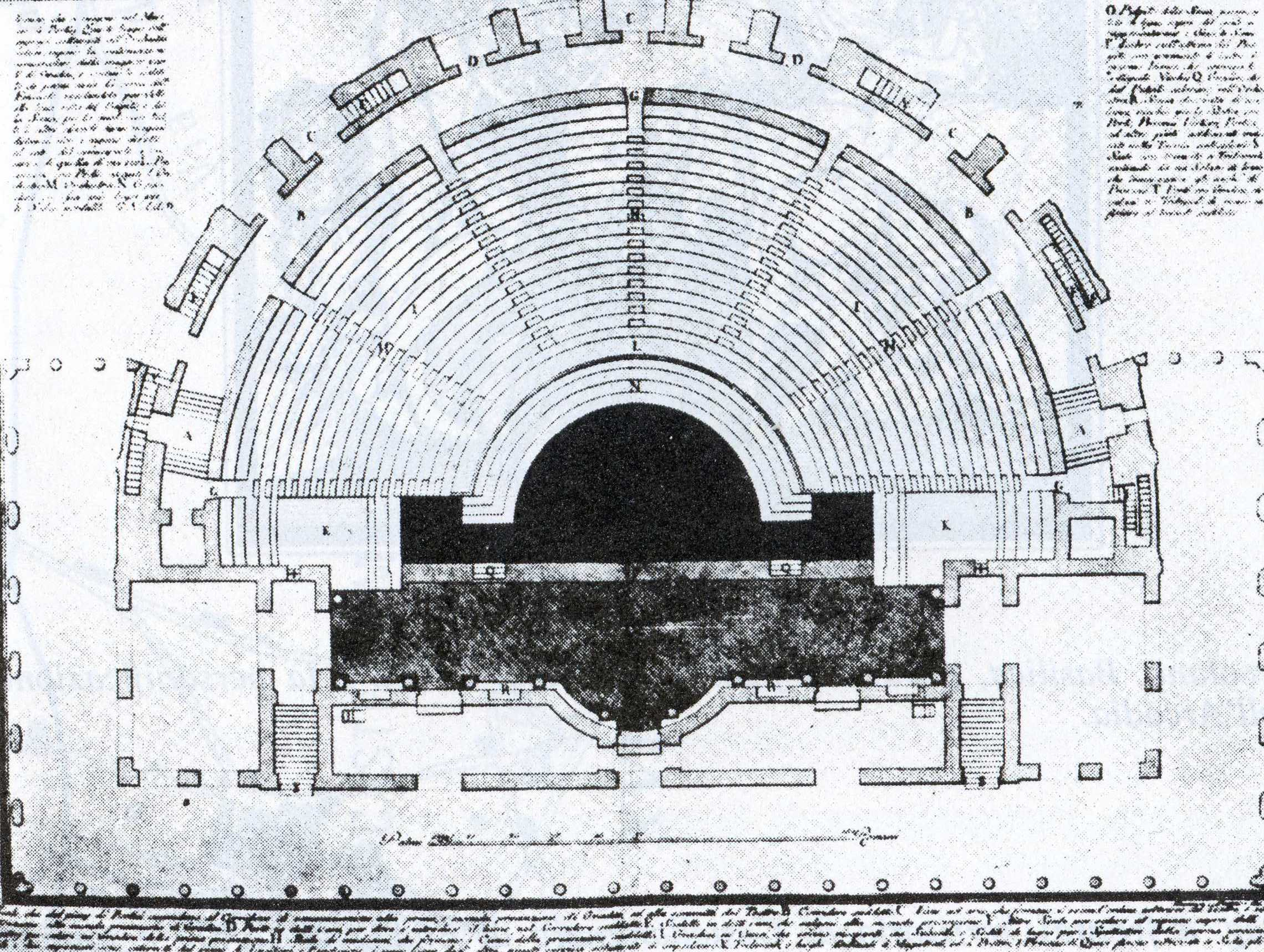 Plan du théatre d'Herculanum selon Piranese